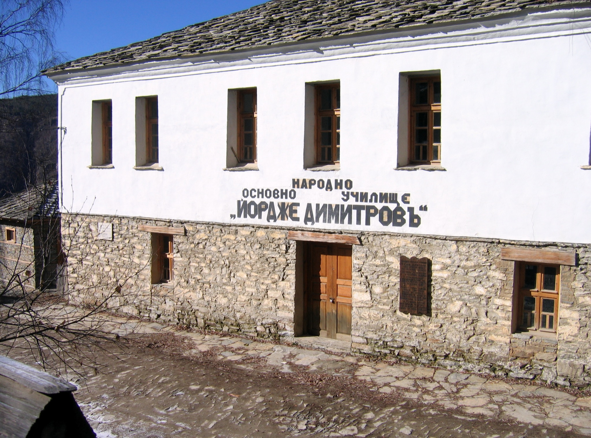 „Народно осново училище ”Йордже Димитров” Ковачевица“